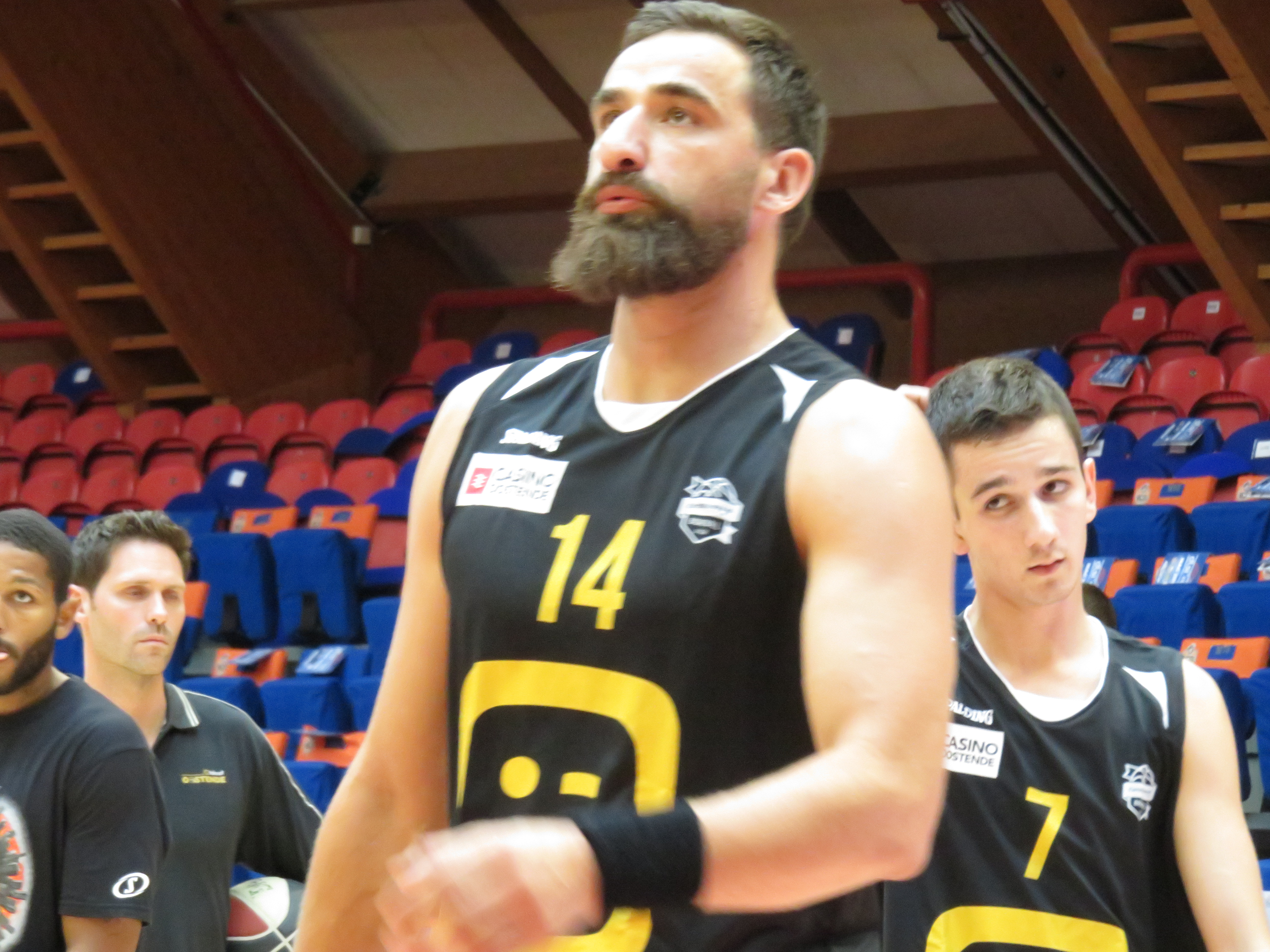 14 Raško Katić